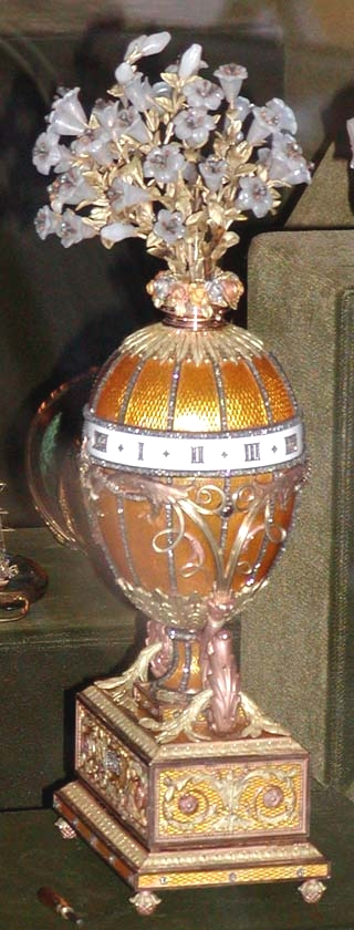 Fabergé-Ee mat Lilien.